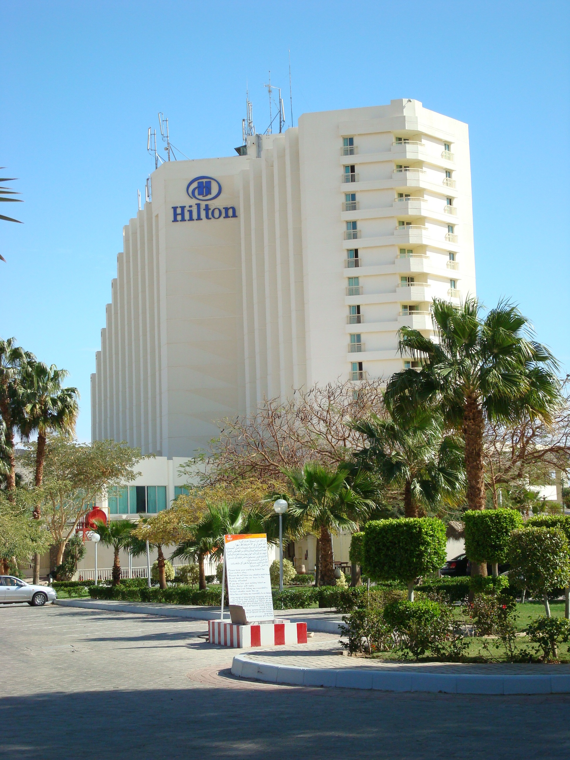 فندق هيلتون طابا منظر خارجي